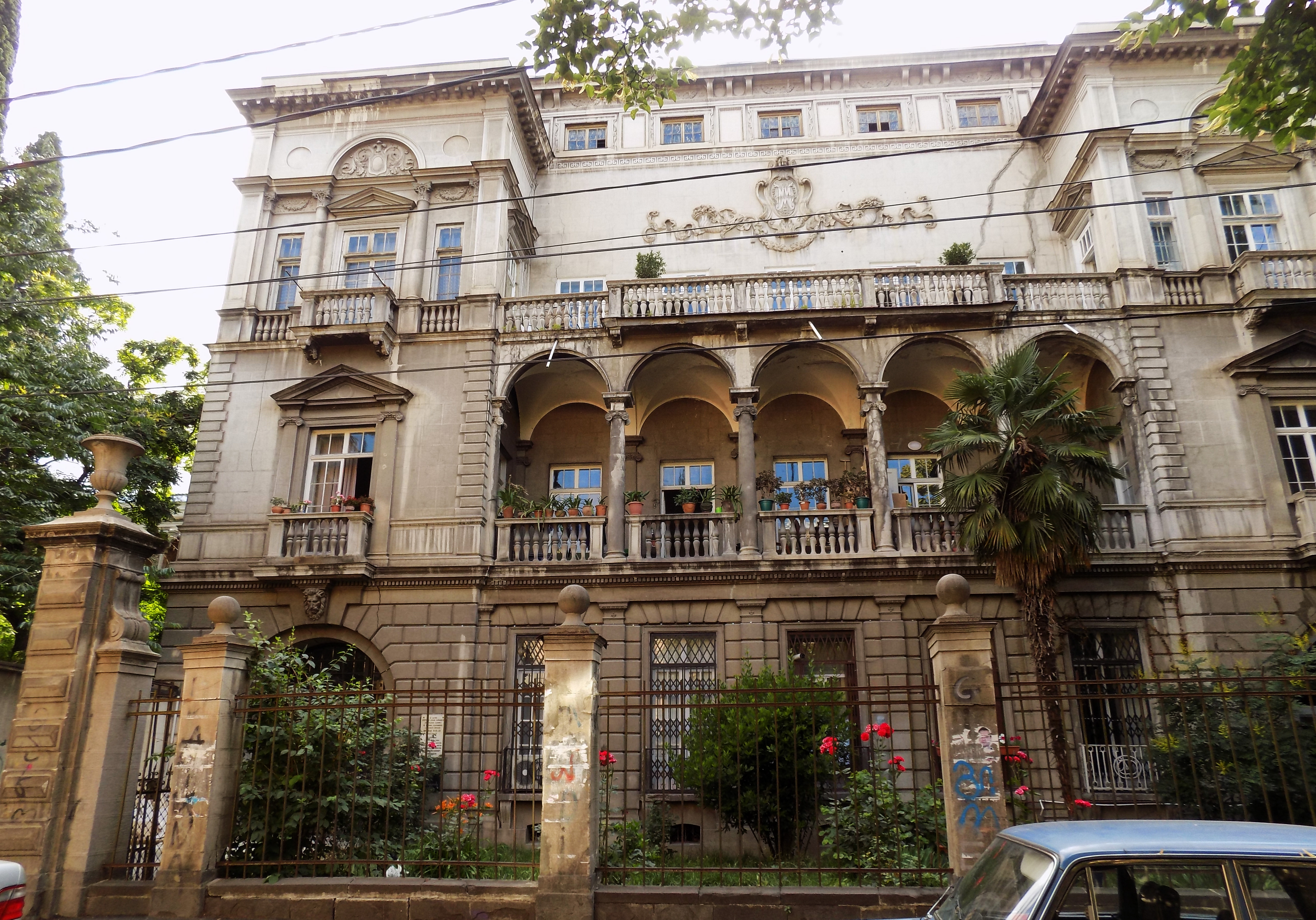 საცხოვრებელი სახლი